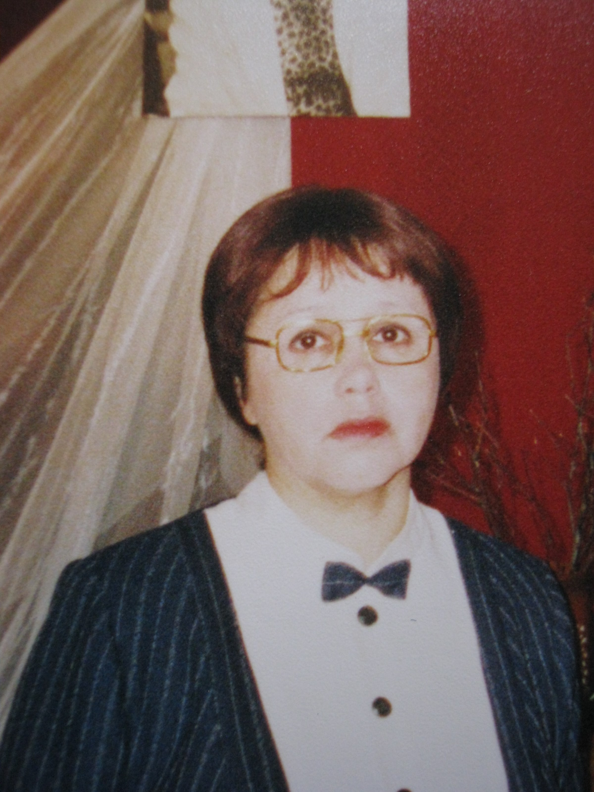 Сцена из спектакля "Идеальная пара" Санкт-Петербургского драматического театра "Патриот" РОСТО. В роли Дины заслуженная артистка России Татьяна Кудрявцева.